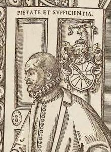 Portrait de Christophe de Savigny